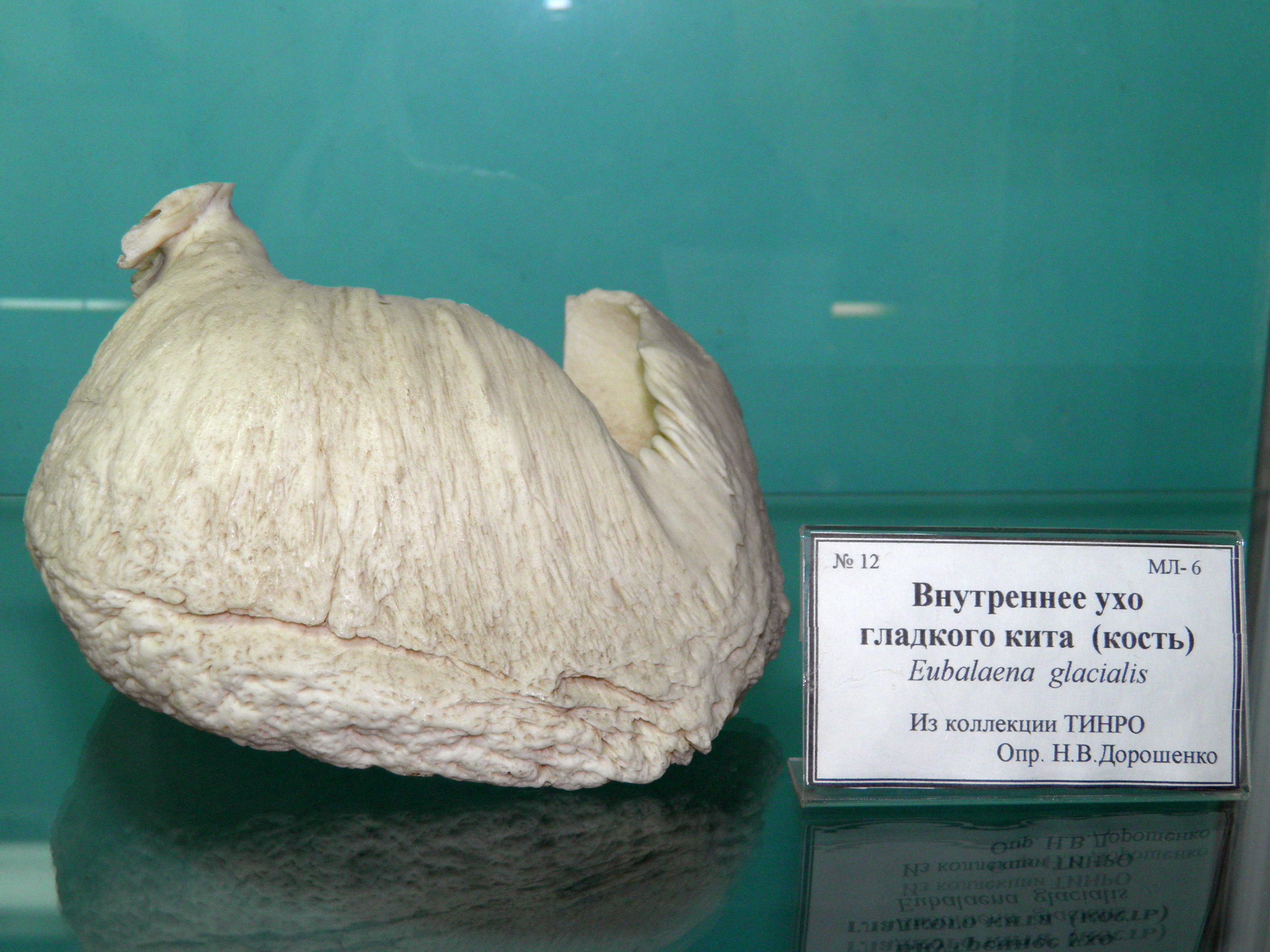 Кость из внутреннего уха северного гладкого кита (Eubalaena glacialis)